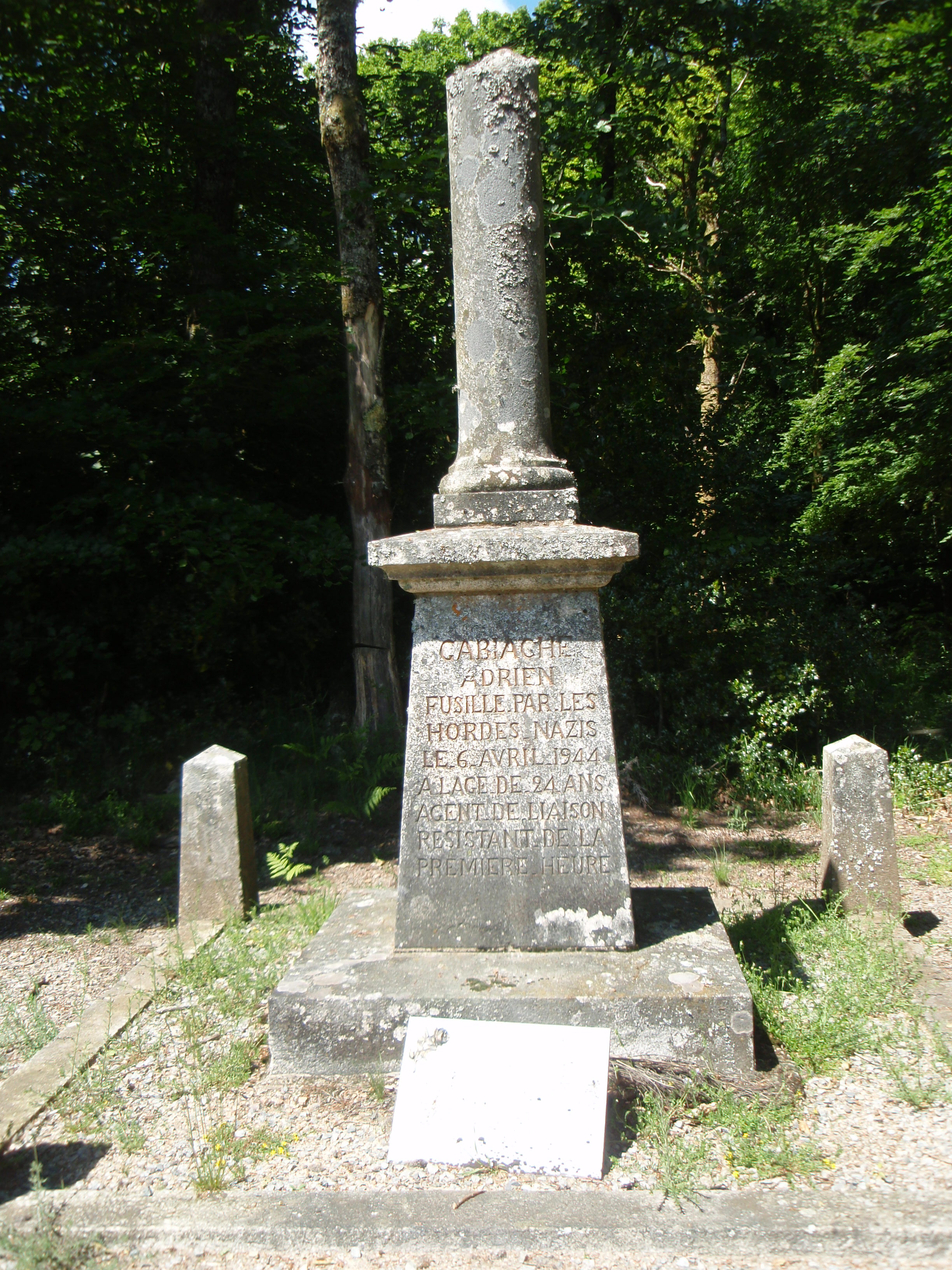 Résistance en Creuse stèle d'Adrien Gabiache fusillé par les nazis en avril 1944